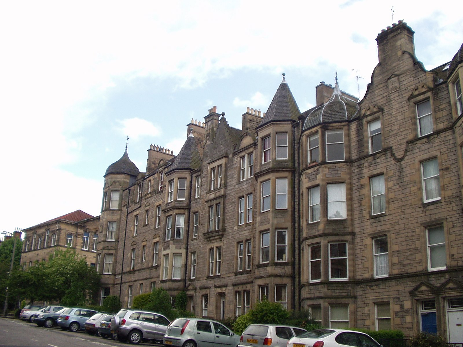 Tenement in Marchmont, Edinburgh built in 1882.